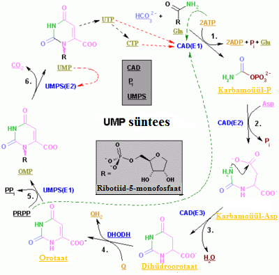 UMP süntees